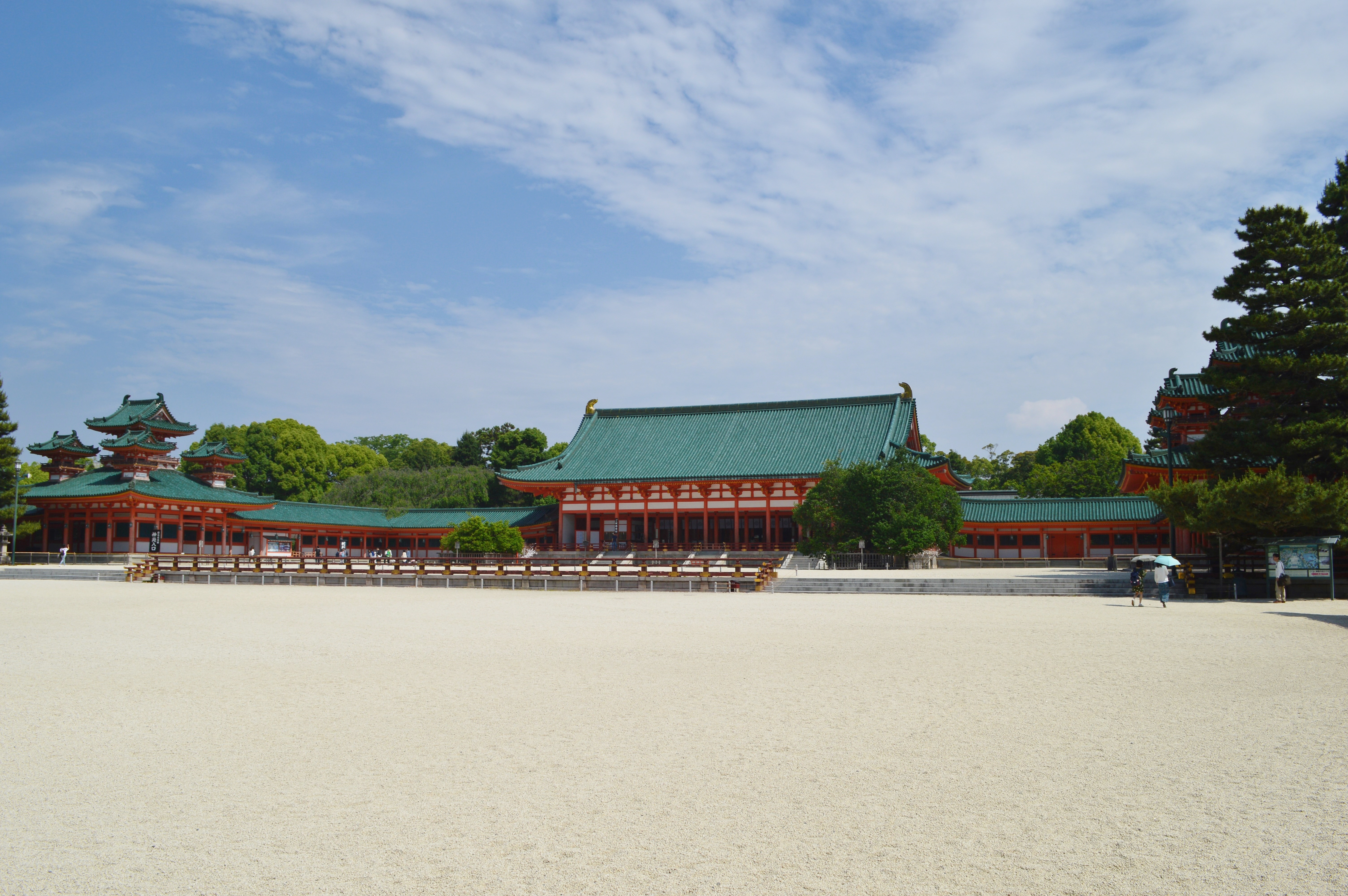 平安神宮 境内